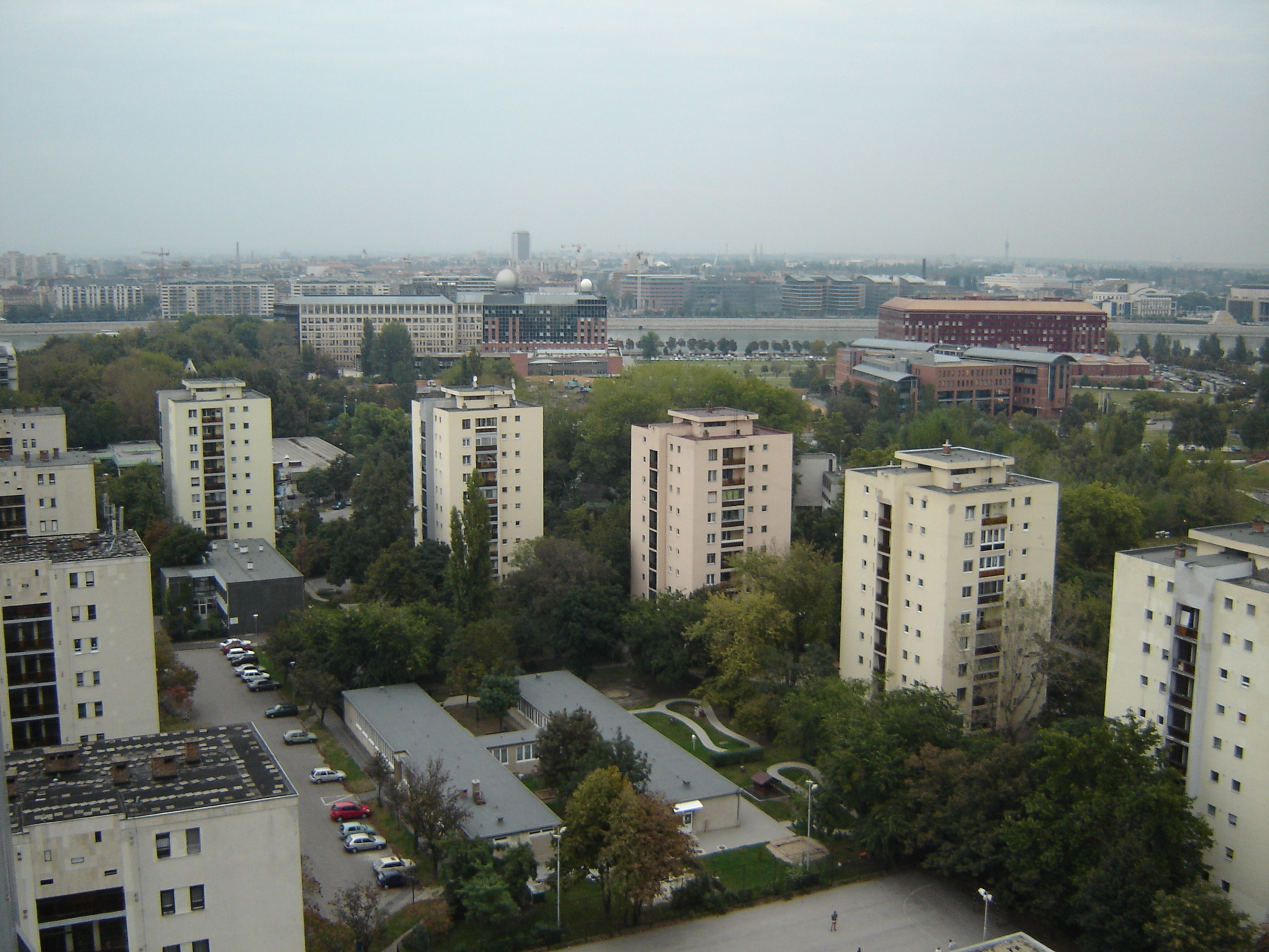 Előtérben a Lágymányosi lakótelep, háttérben az ELTE északi, déli, valamint a BME informatikai épülete (Budapest)